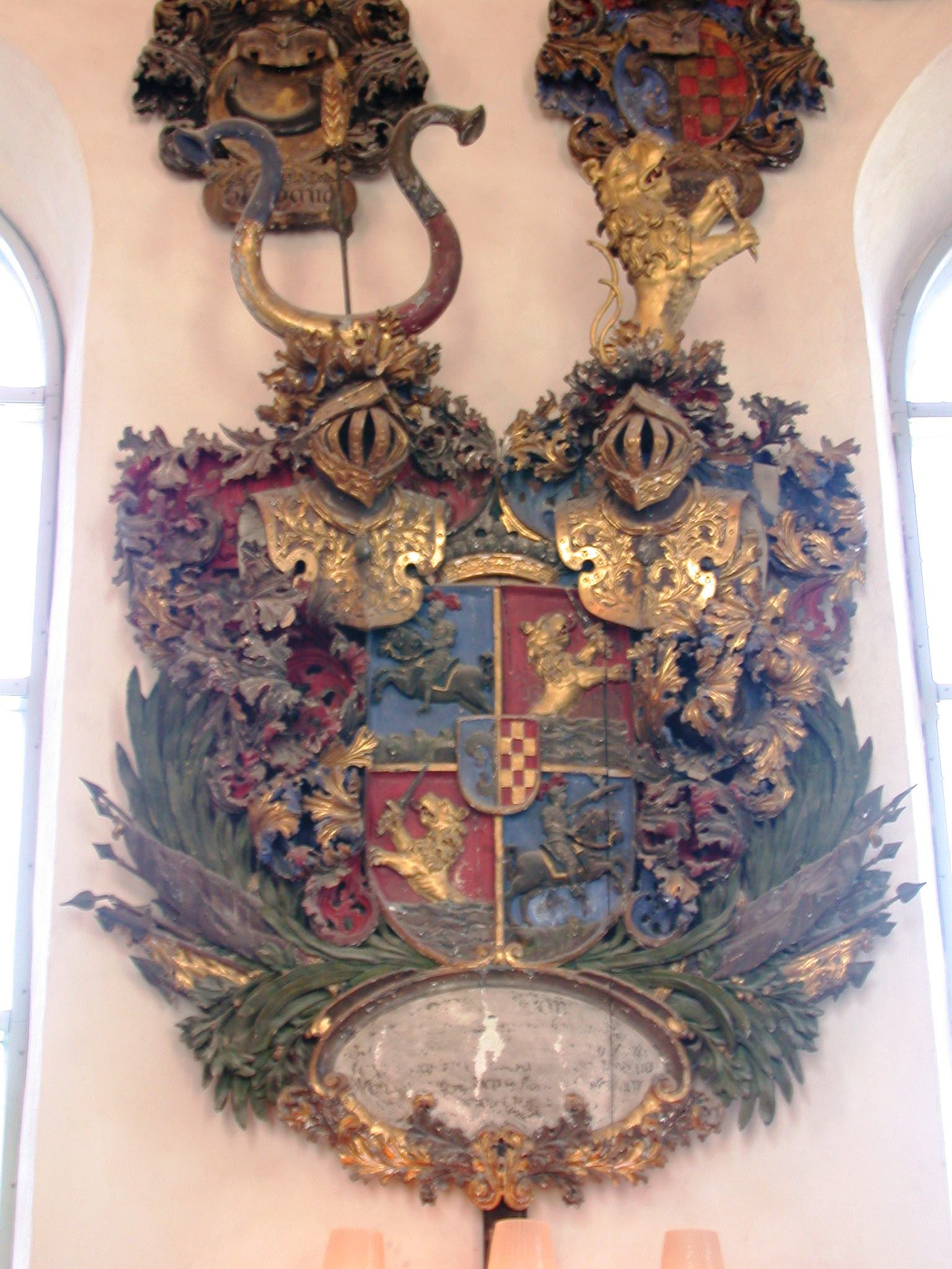 Kruus epitaph, Björklinge kyrka, Uppsala, Sweden. Photo by Riggwelter, July 16, 2006.